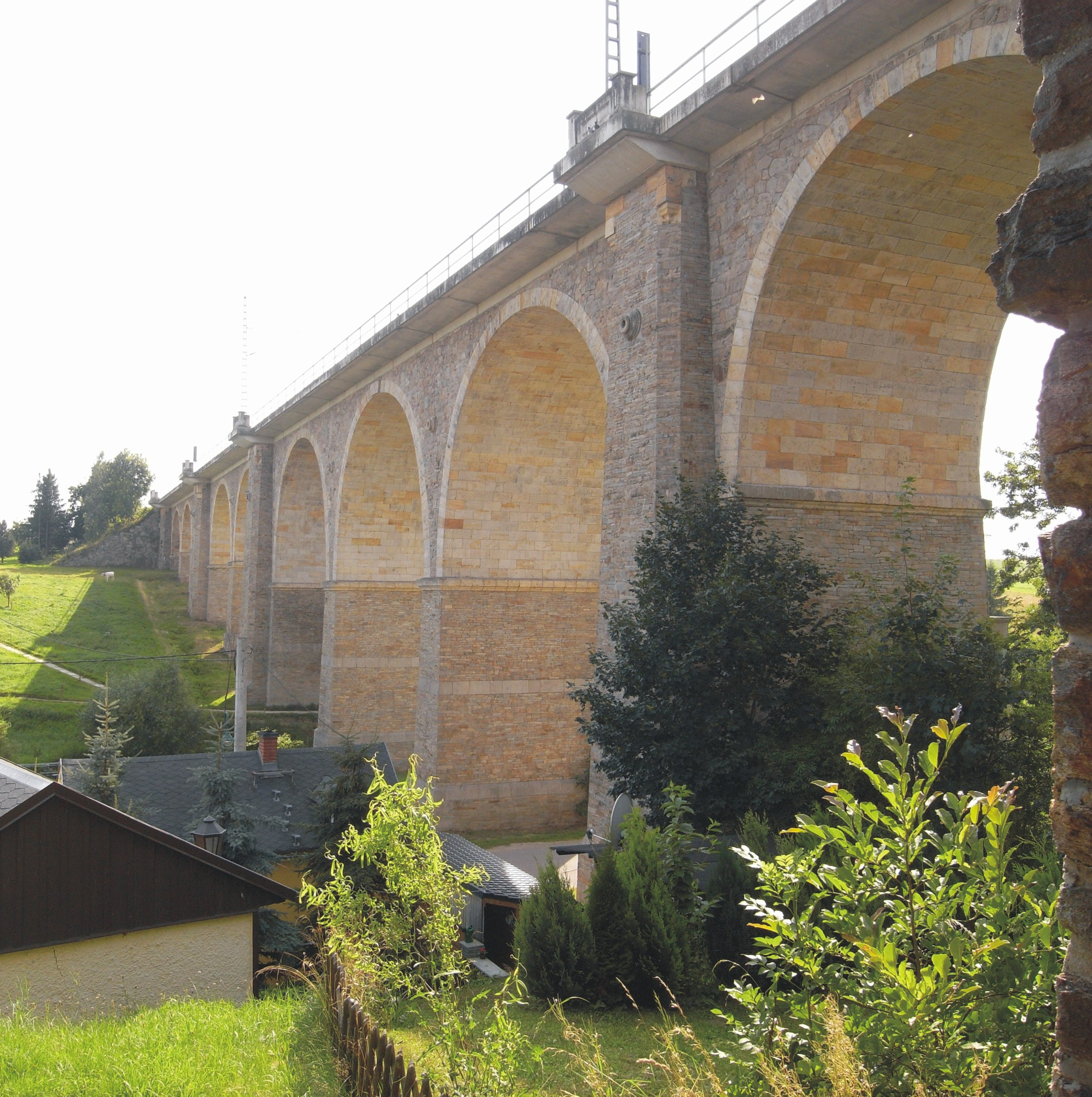 Eisenbahnviadukt der Strecke Dresden–Werdau in Colmnitz (Deutschland, Sachsen)